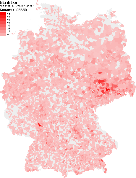 Verteilung des Nachnamens Winkler in Deutschland nach dem Telefonbuch mit Stand vom 6. Januar 2005